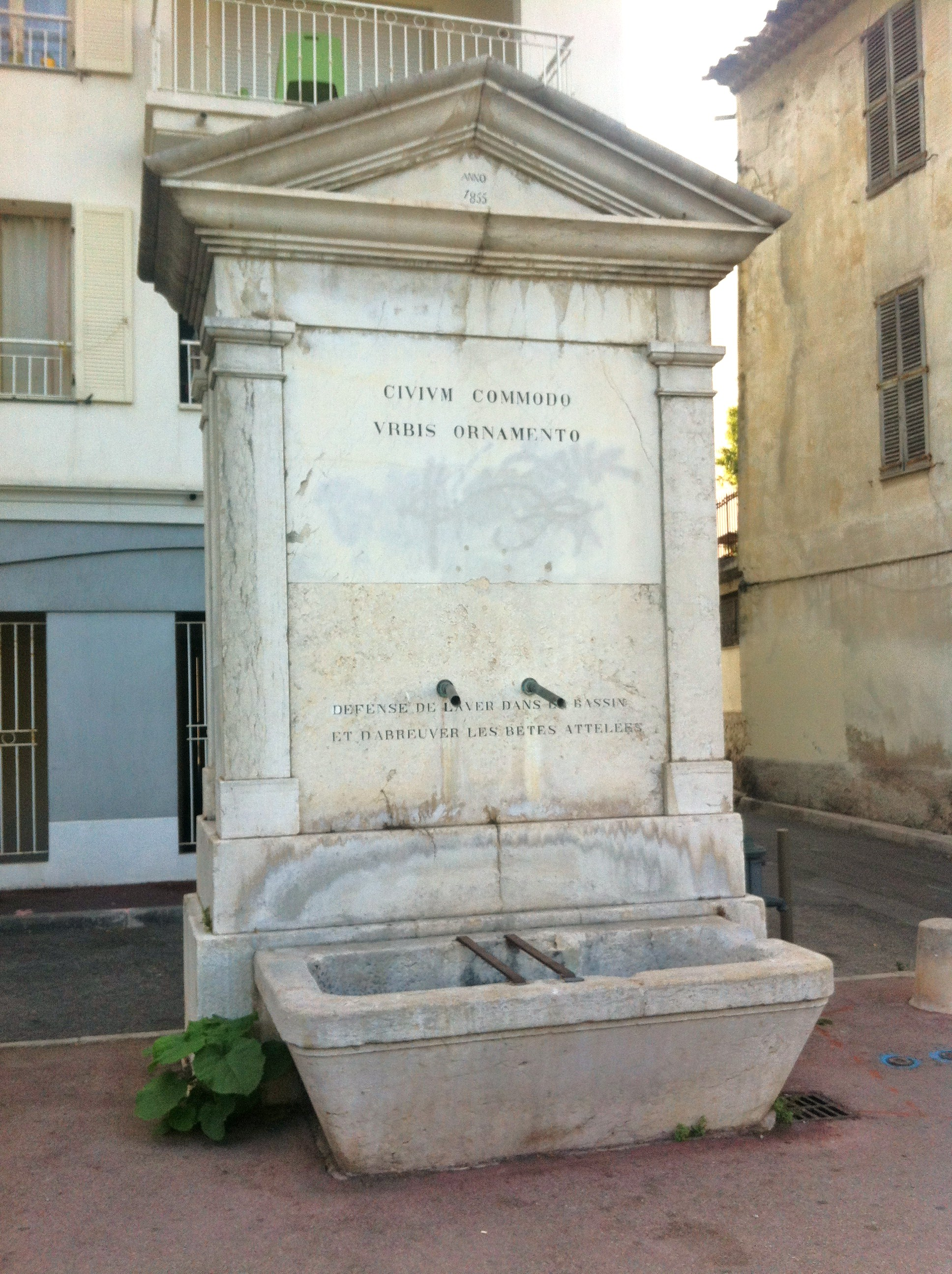 Antibes La fontaine de 1855